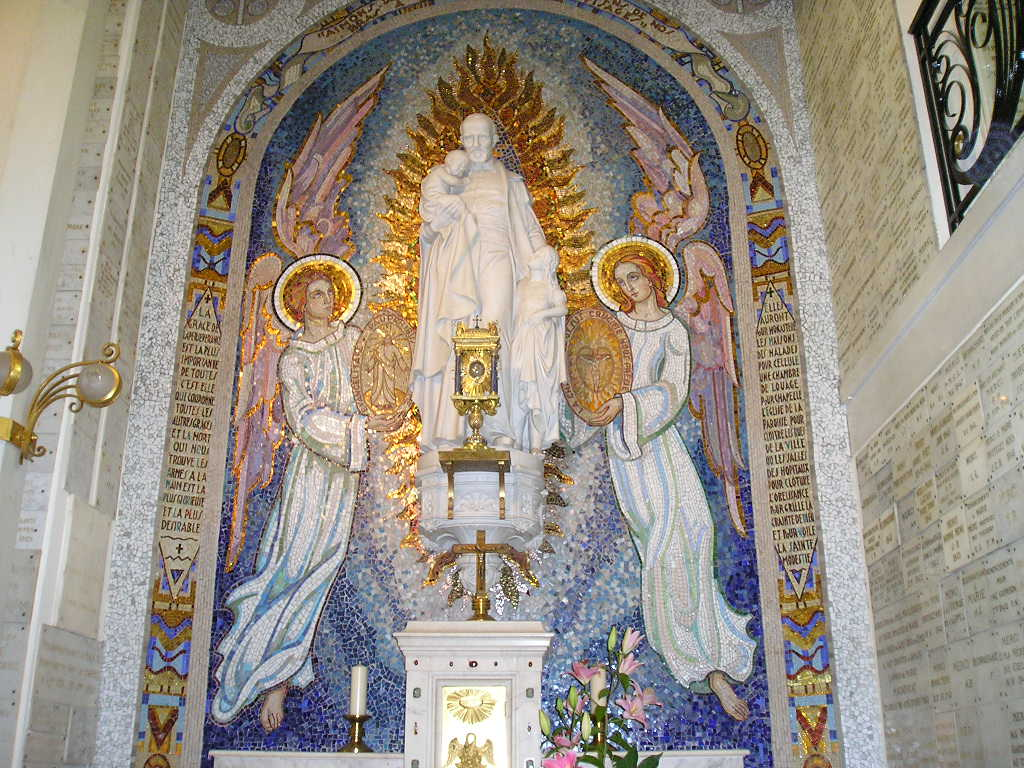 Description du contenu=